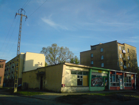 Osiedle Kolejki od strony ul. Armii Krajowej